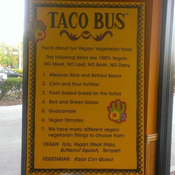 Taco Bus USF